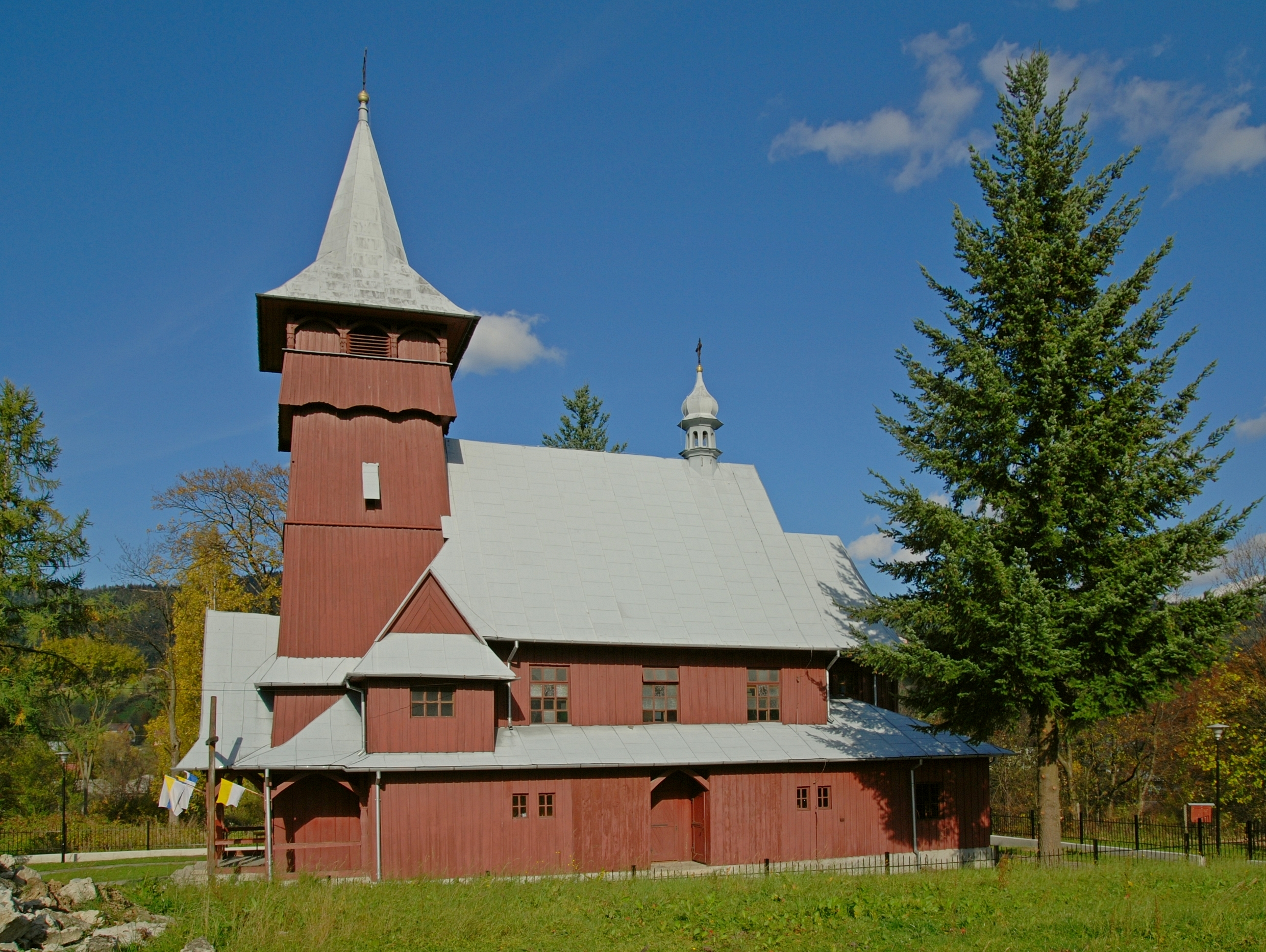 wieś Łabowa